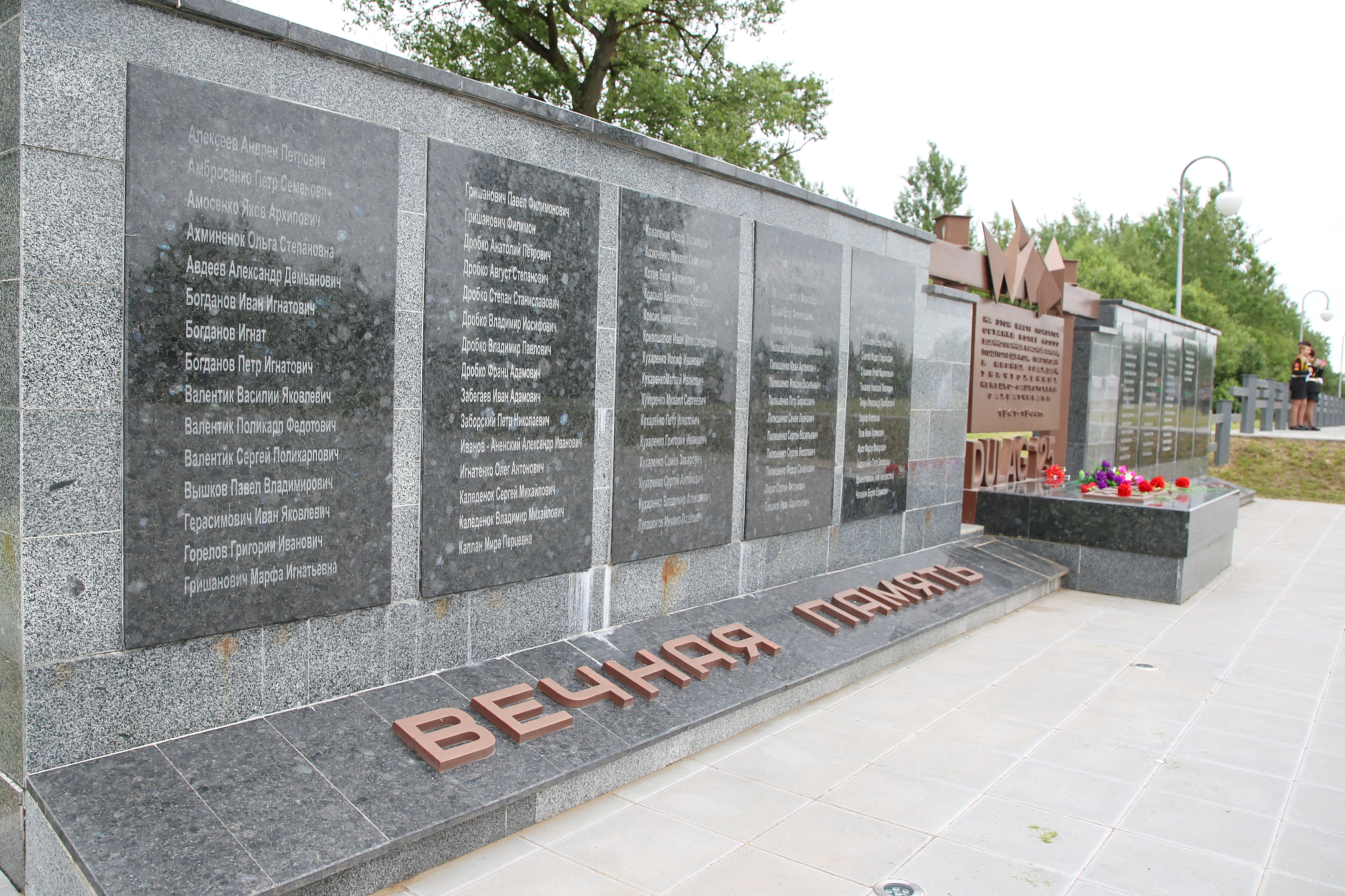 22 июня 2020 г